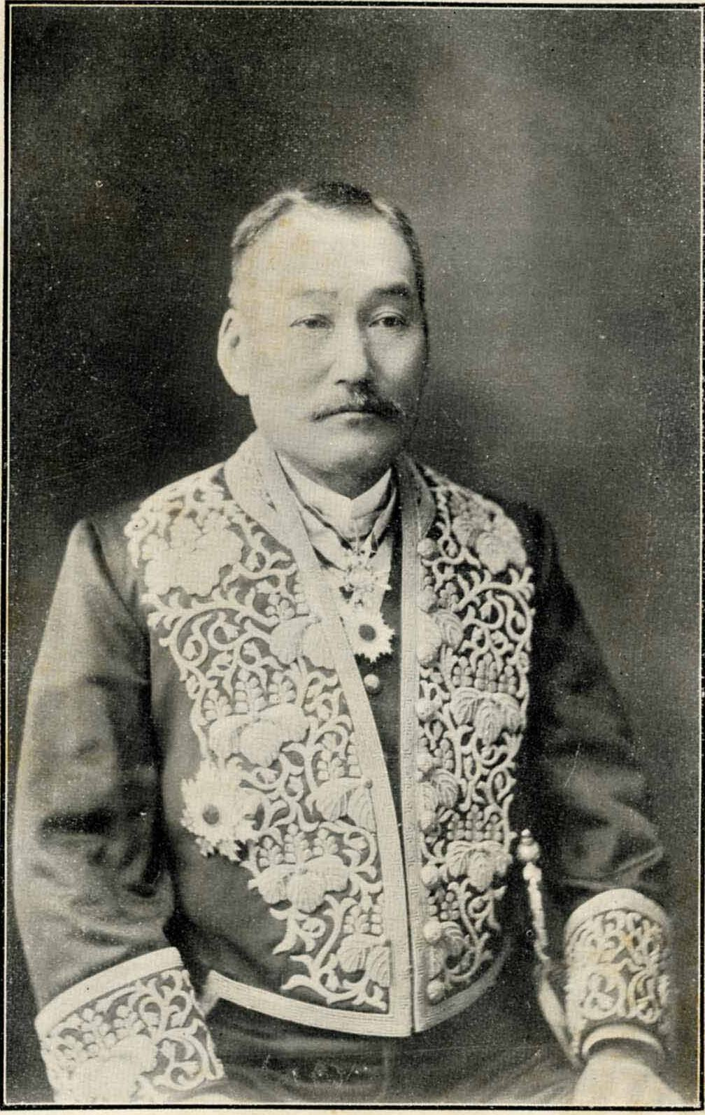 長谷川謹介